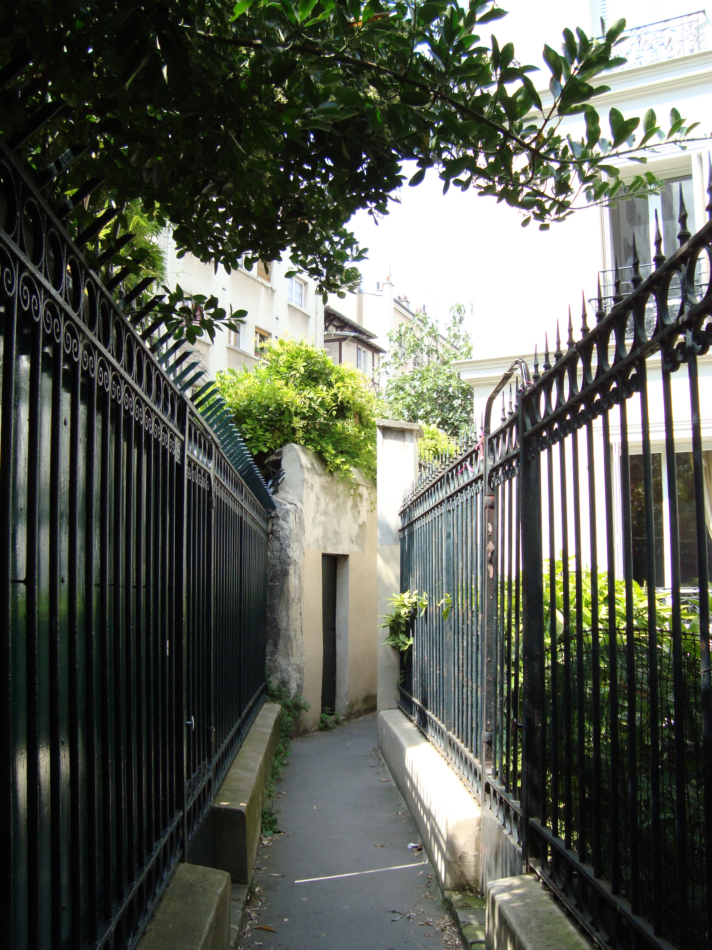 Le sentier des Merisiers dans le 12e arrondissement de Paris, considéré comme le plus étroit de la ville. Vue de la partie centrale